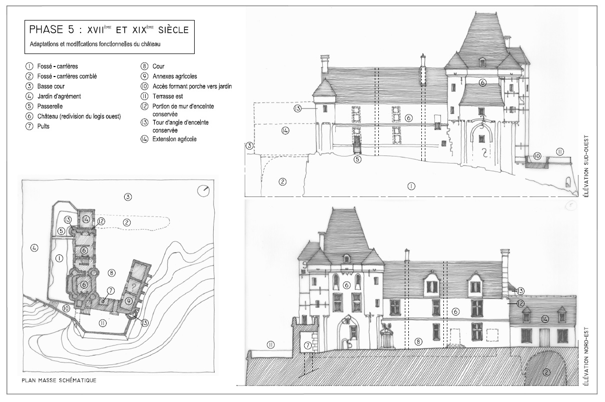 Châtelet de Pernant au XVIII° & XIX°